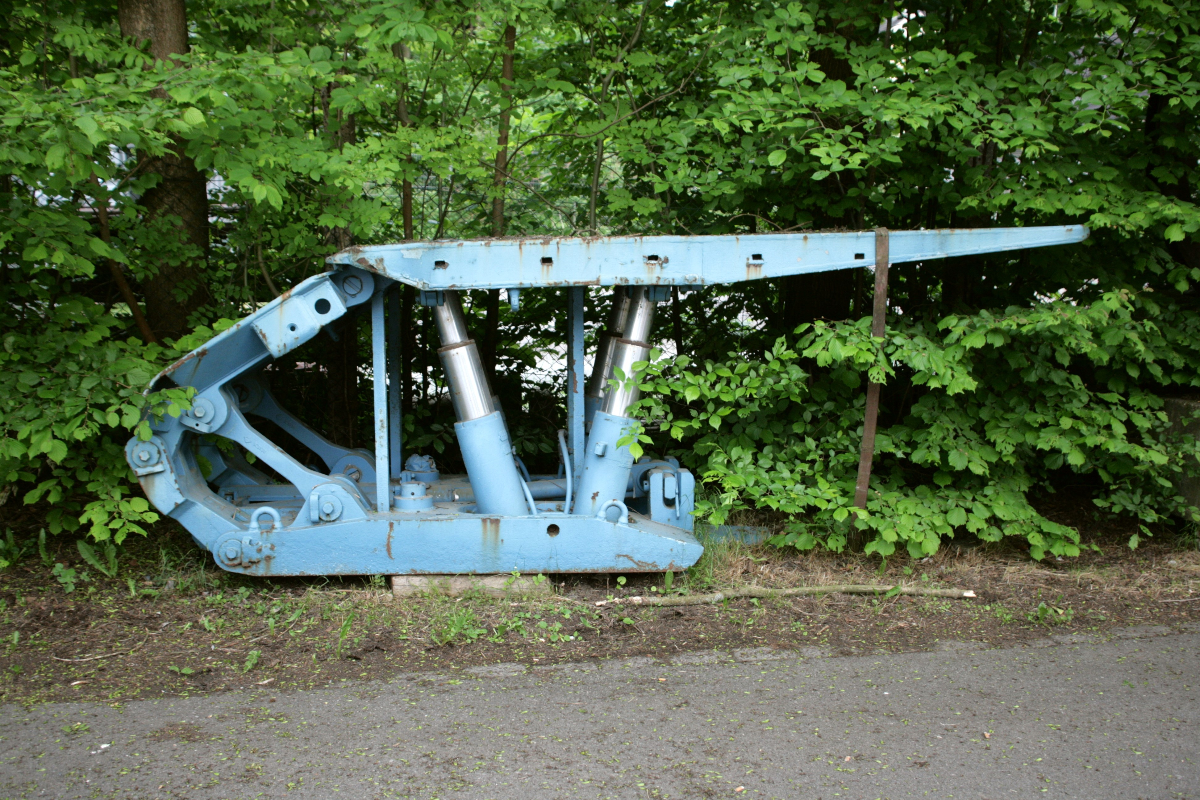 Zeche Blankenburg im Hammertal in Witten